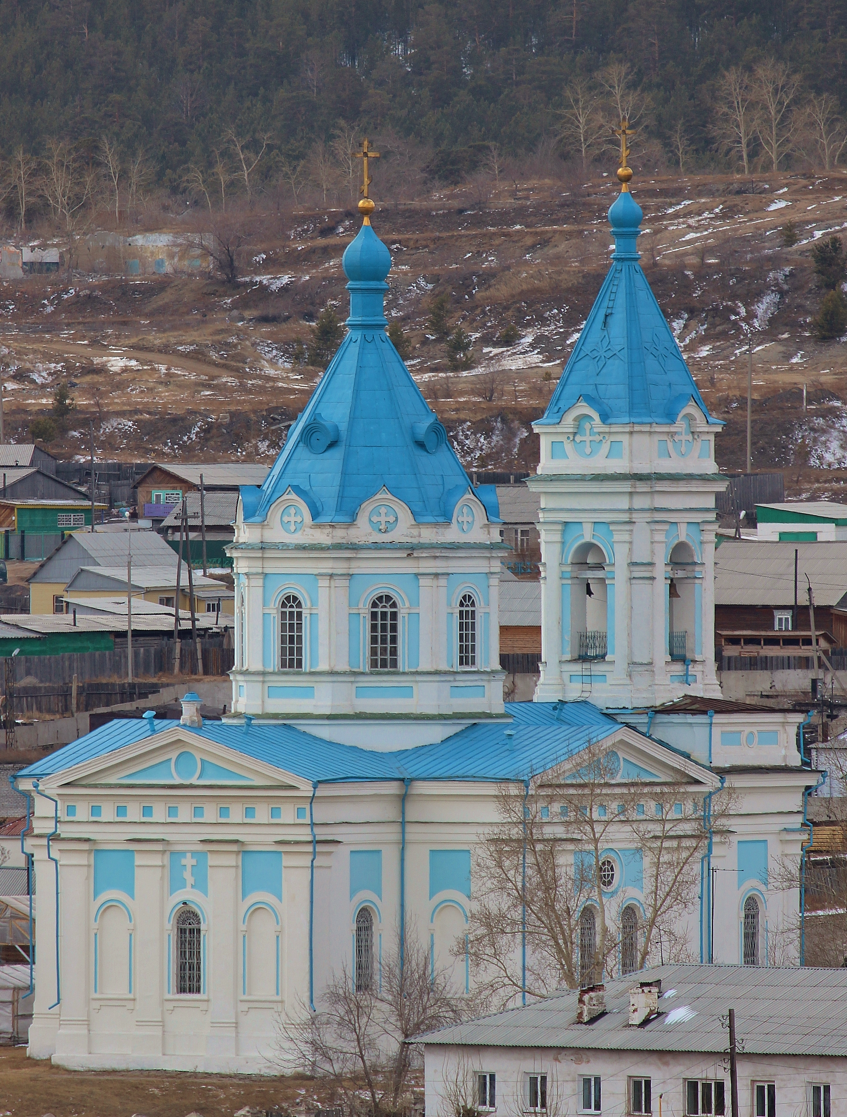 Успенская церковь в Кяхте